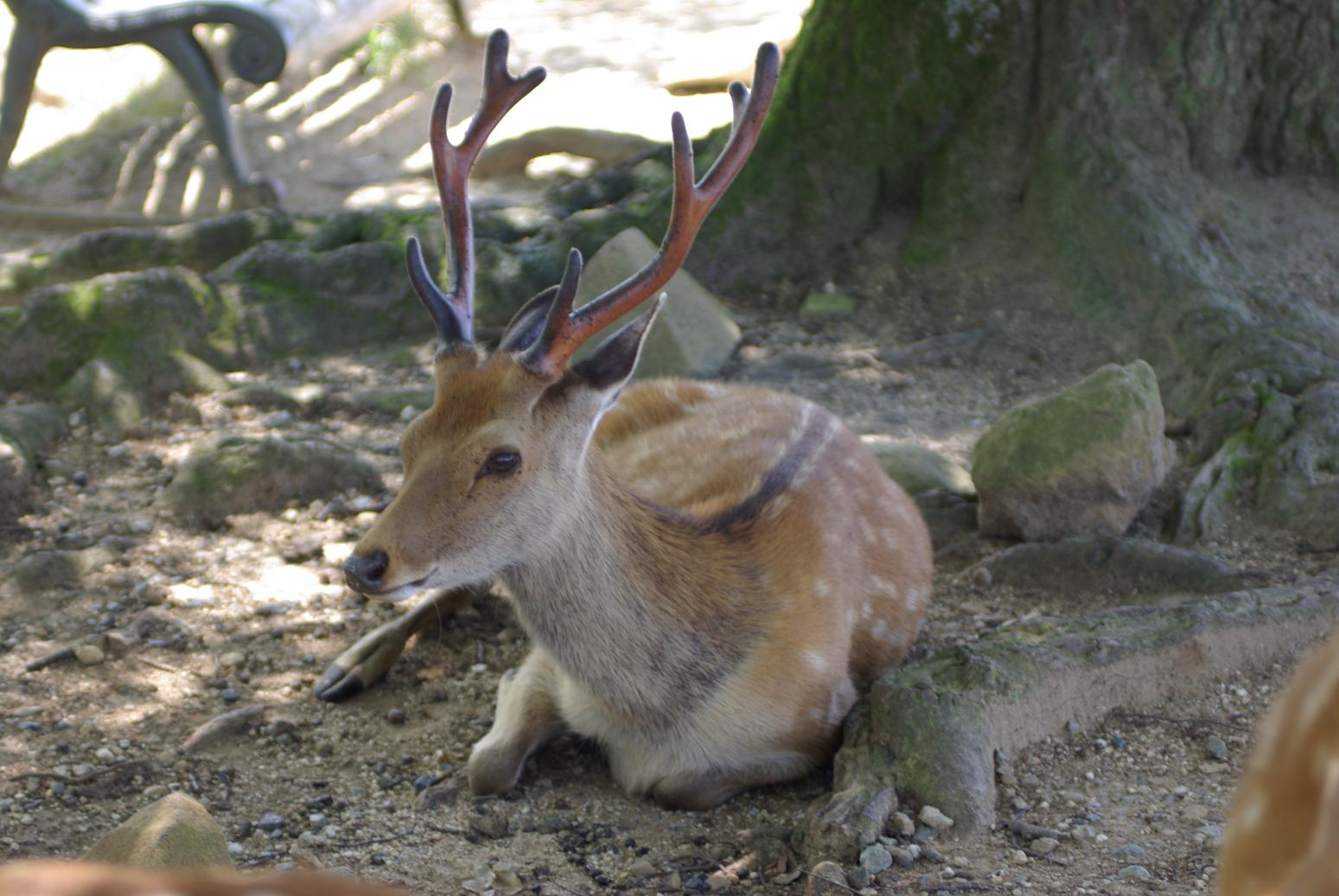 若草山頂上の木陰で休む鹿（♂）